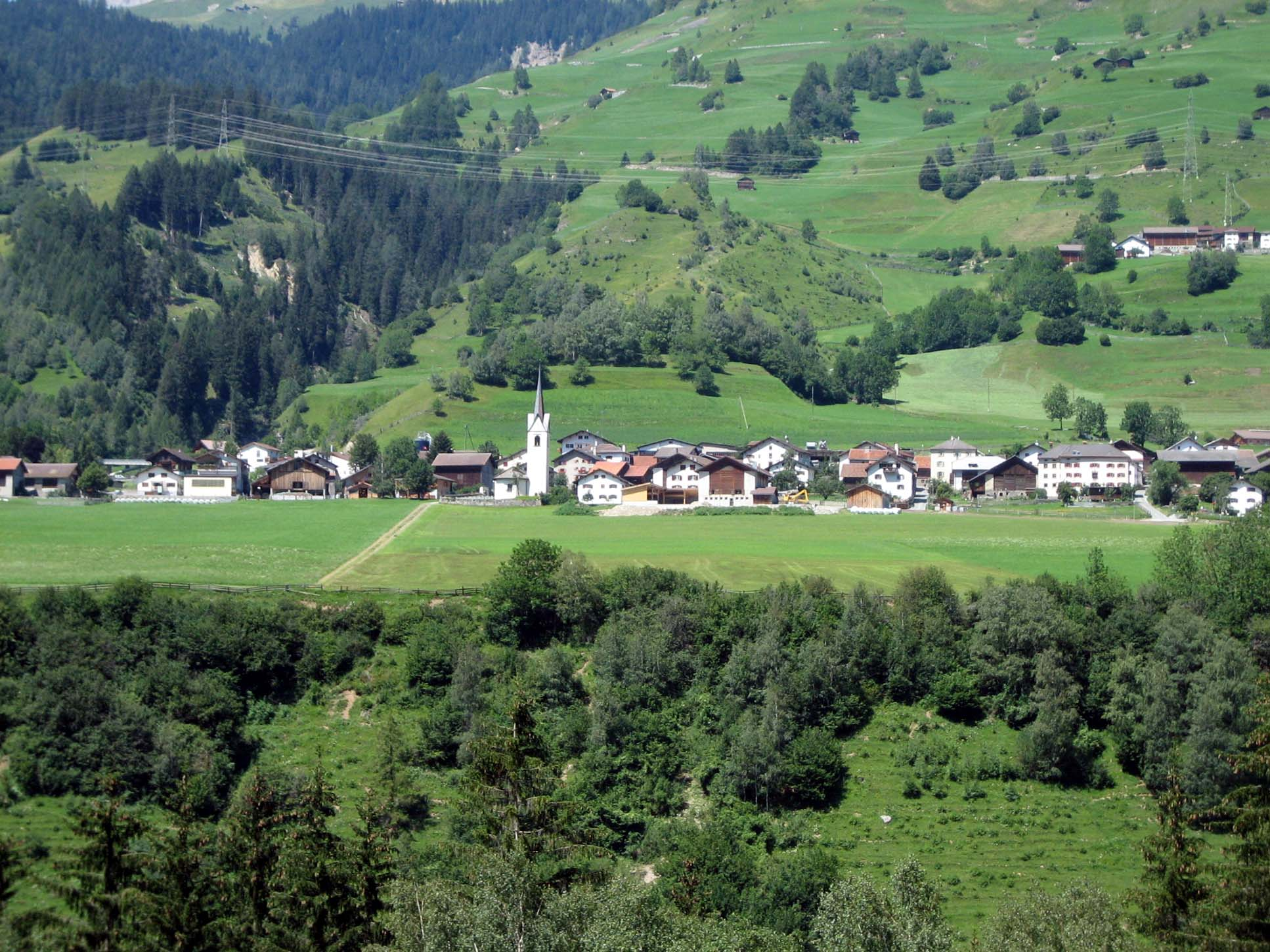 Donat